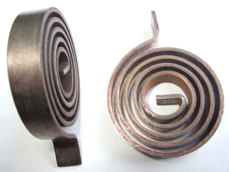 Bobina Bimetálica Utilizada em Termostatos